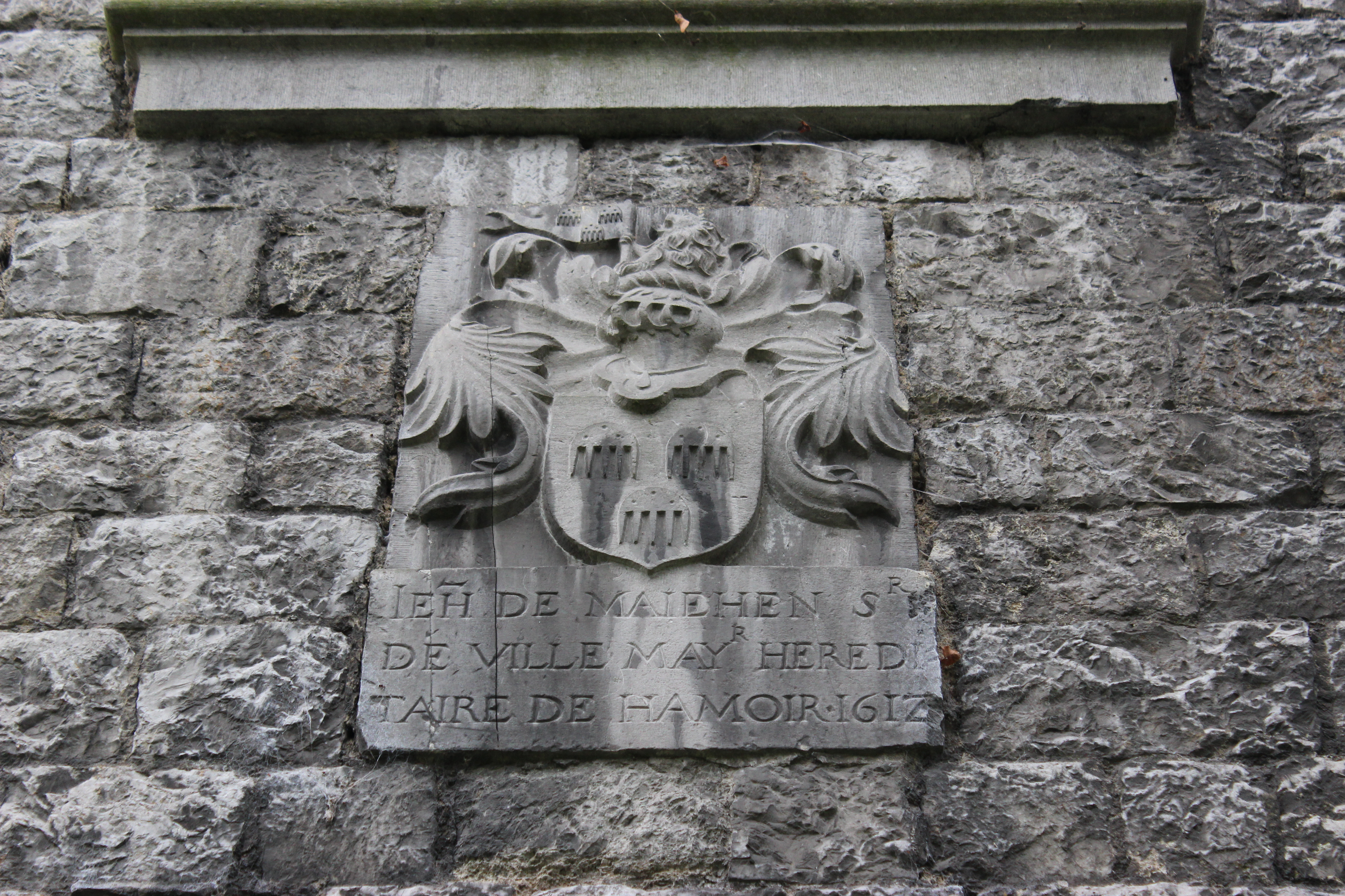 Blason de IEH (Jean?) de Maillen, Maieur héréditaire de Hamoir, 1612